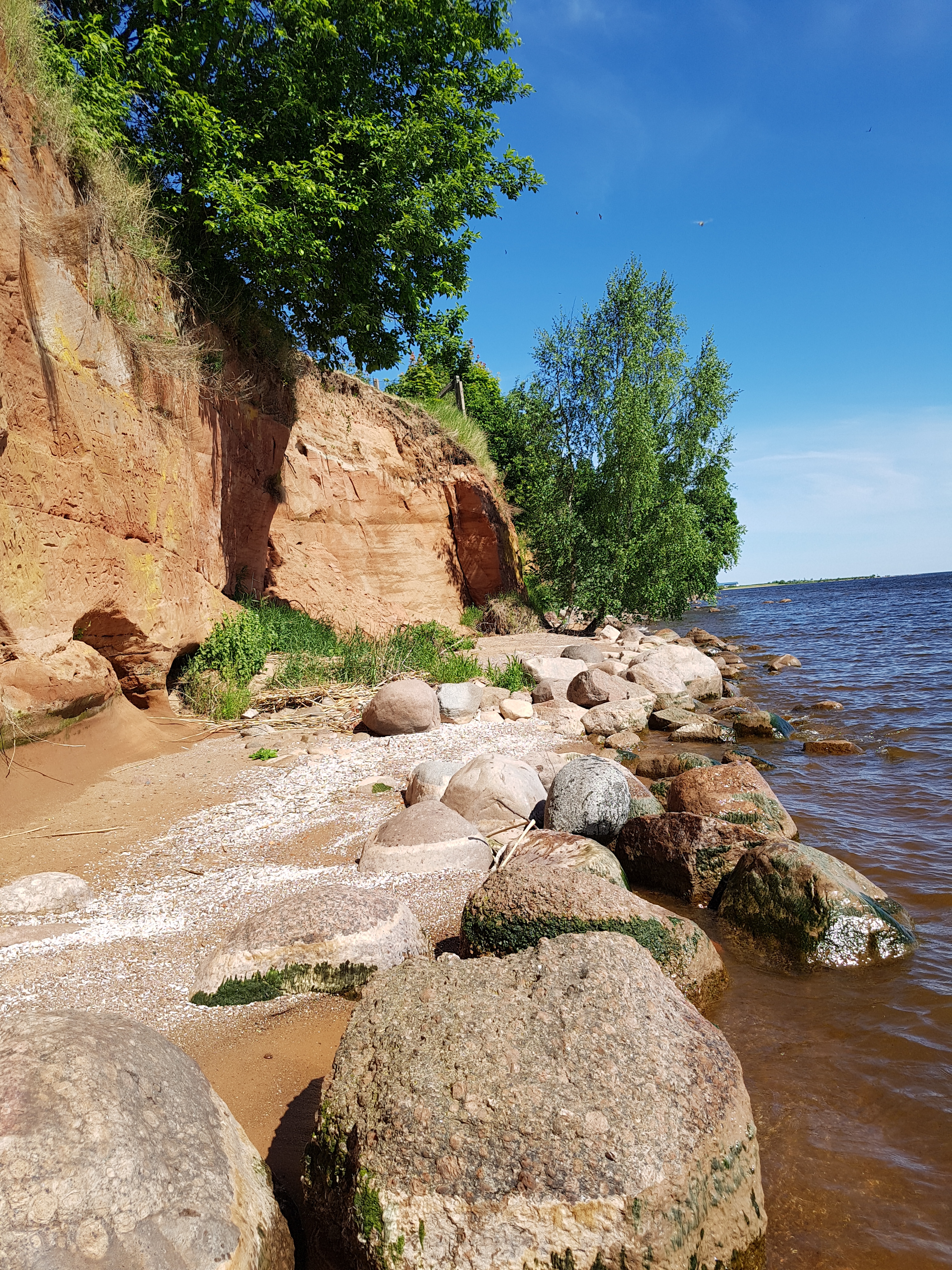 Kallaste liivakivipaljand